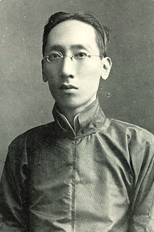 Bân-lâm-gú: Lîm Siong-siū